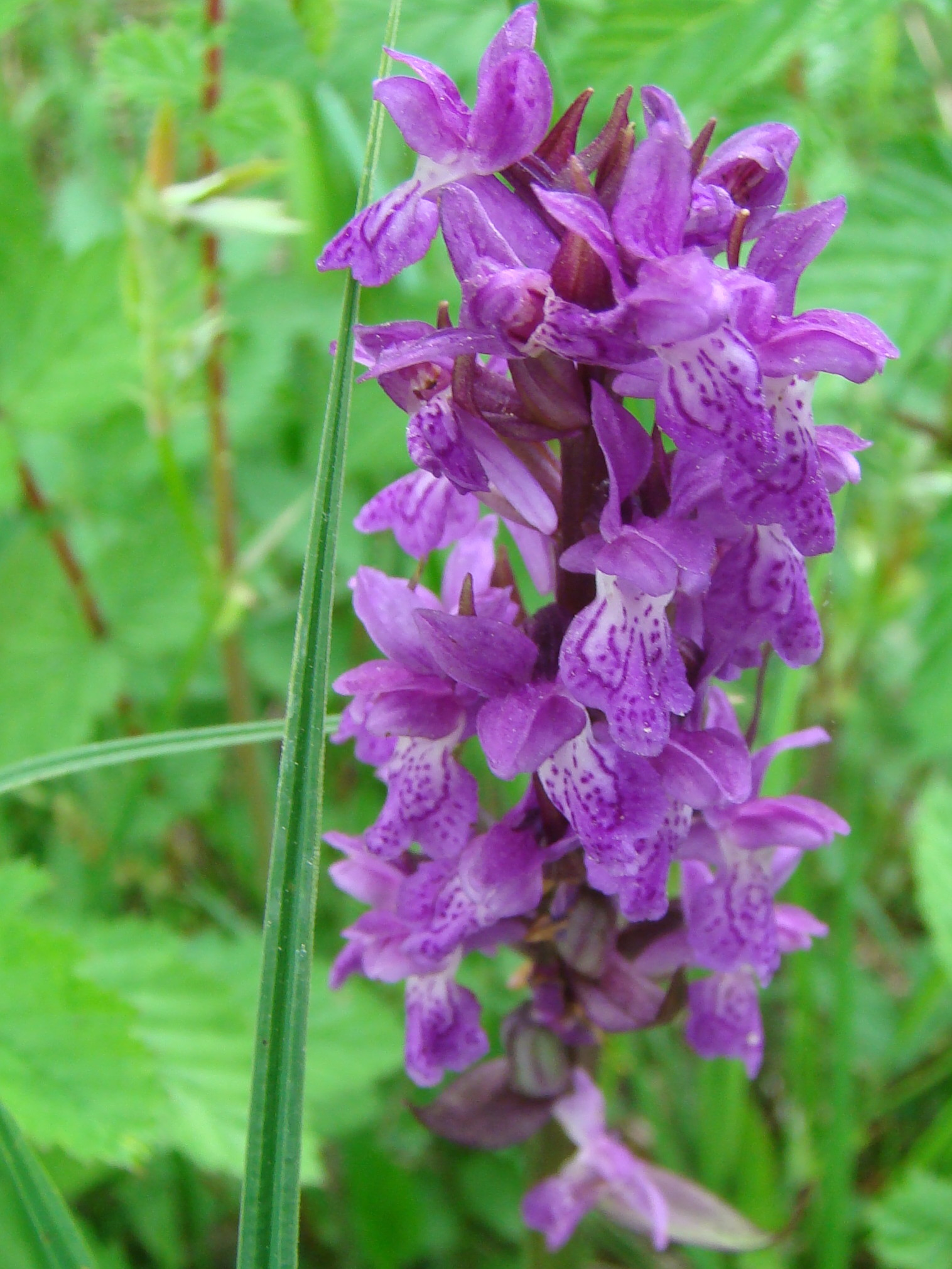 Blühendes Breitblättriges Knabenkraut (Dactylorhiza majalis)